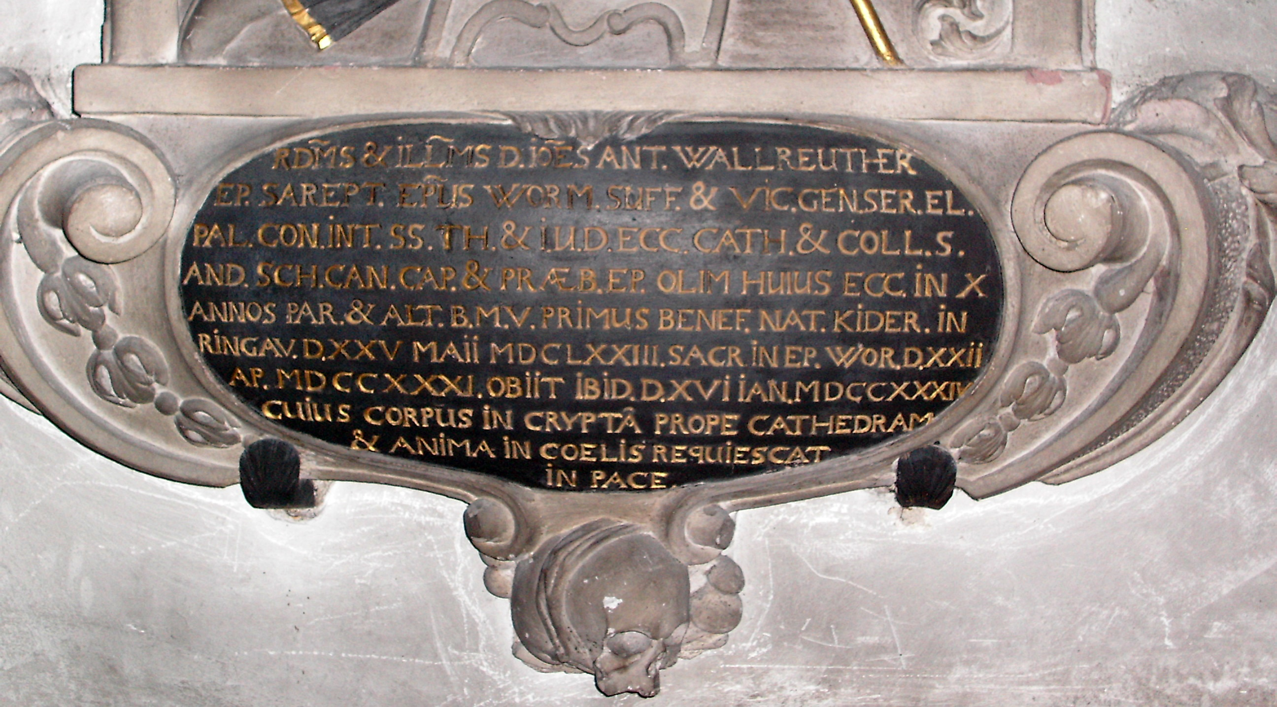 Johann Anton Wallreuther, Weihbischof von Worms (+1734), Grabinschrift vom Epitaph, Worms, Liebfrauen